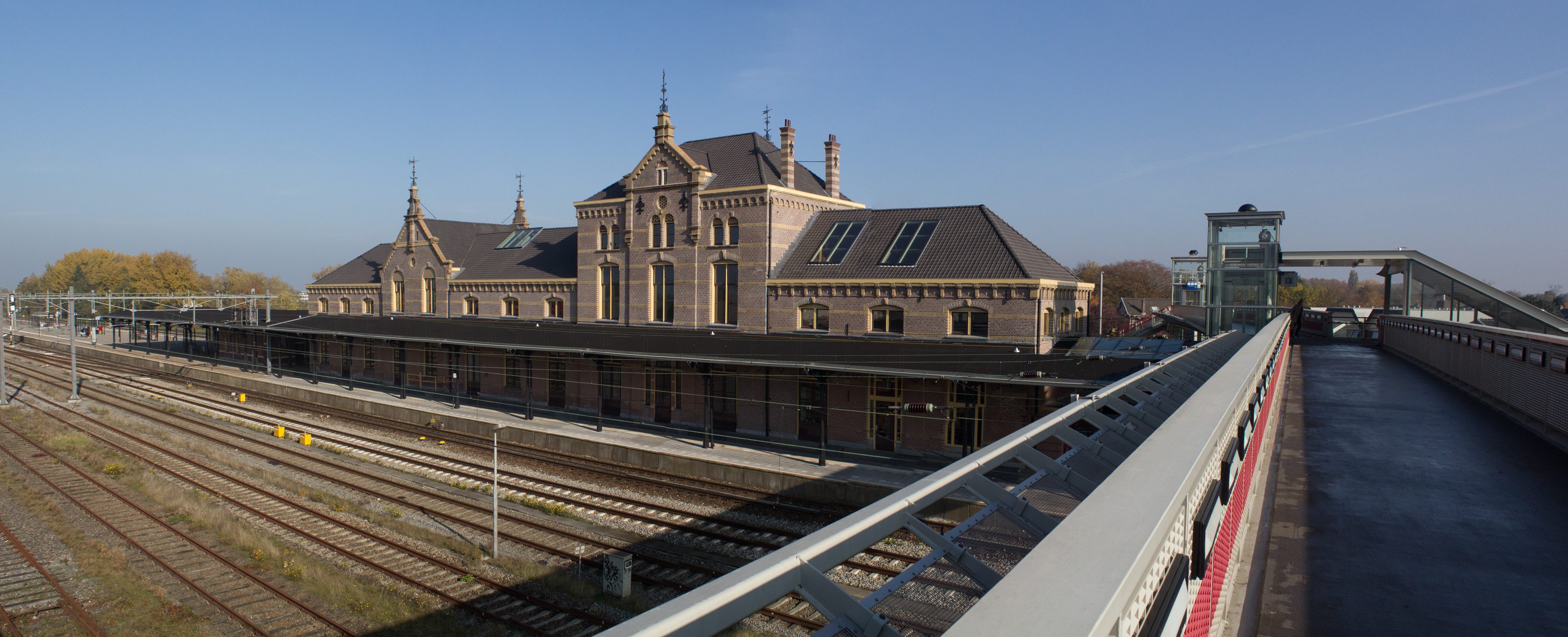 Station Geldermalsen - hoofdgebouw